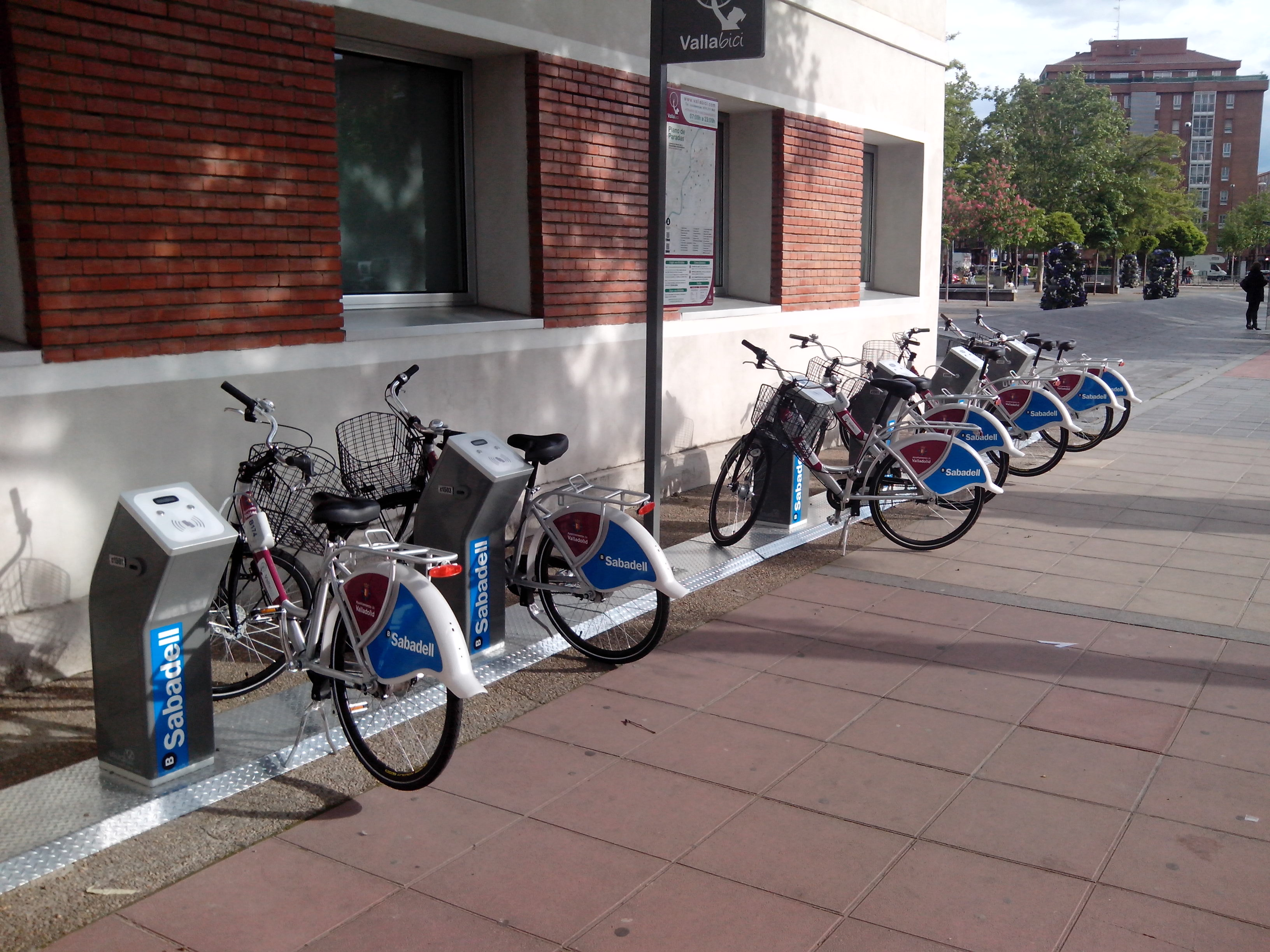 Punto de Vallabici en Valladolid